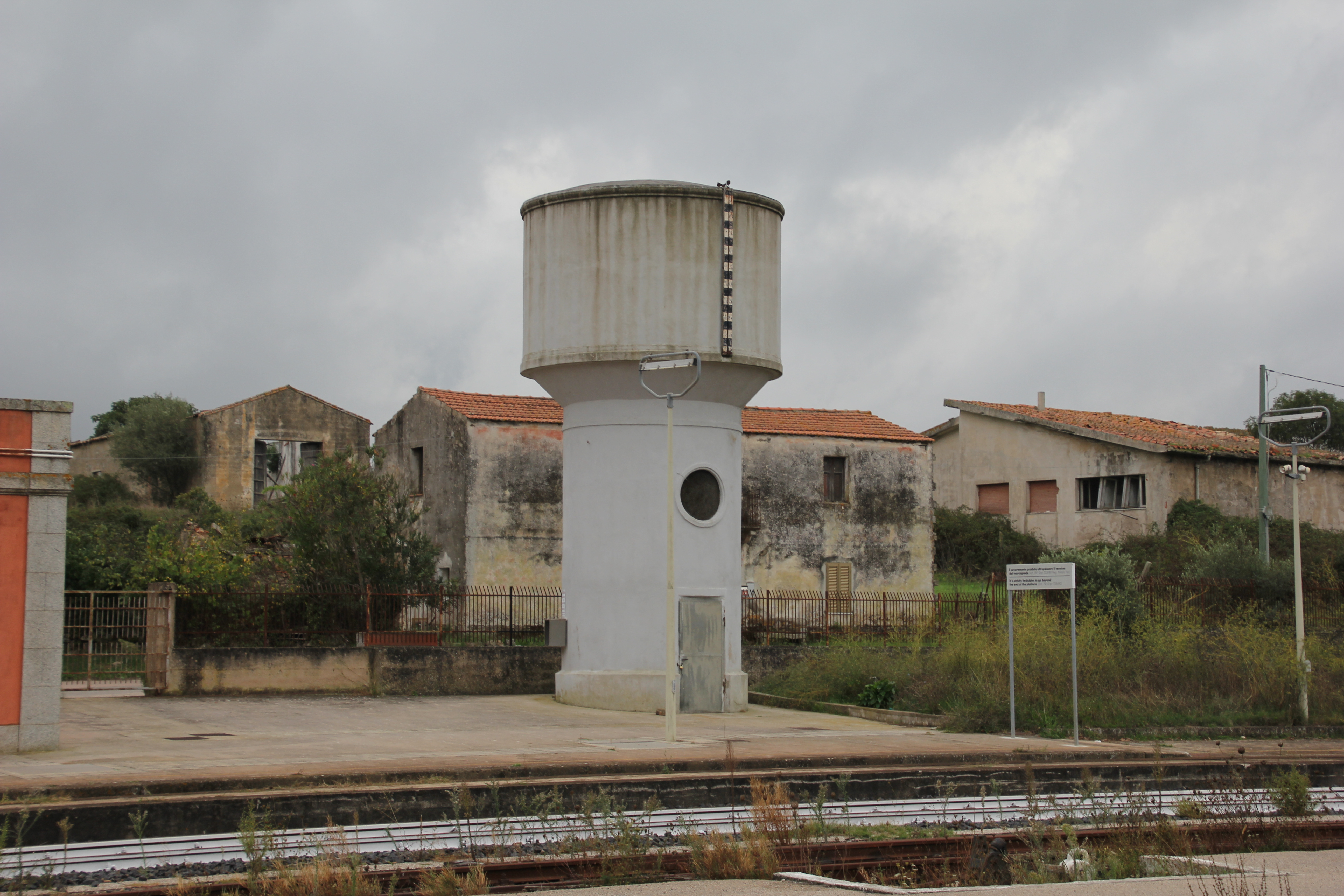 Monti, stazione ferroviaria